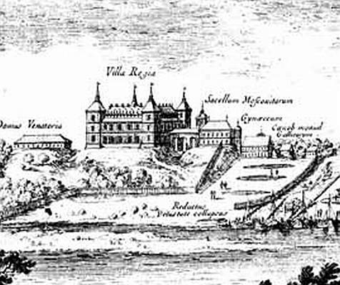 Panorama Warszawy, 1656